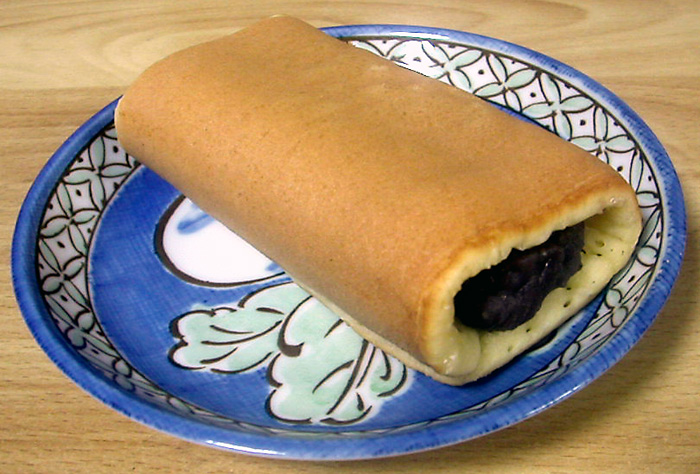 撮影者：小太刀 大あんまき。藤田屋の大あんまき。黒餡。